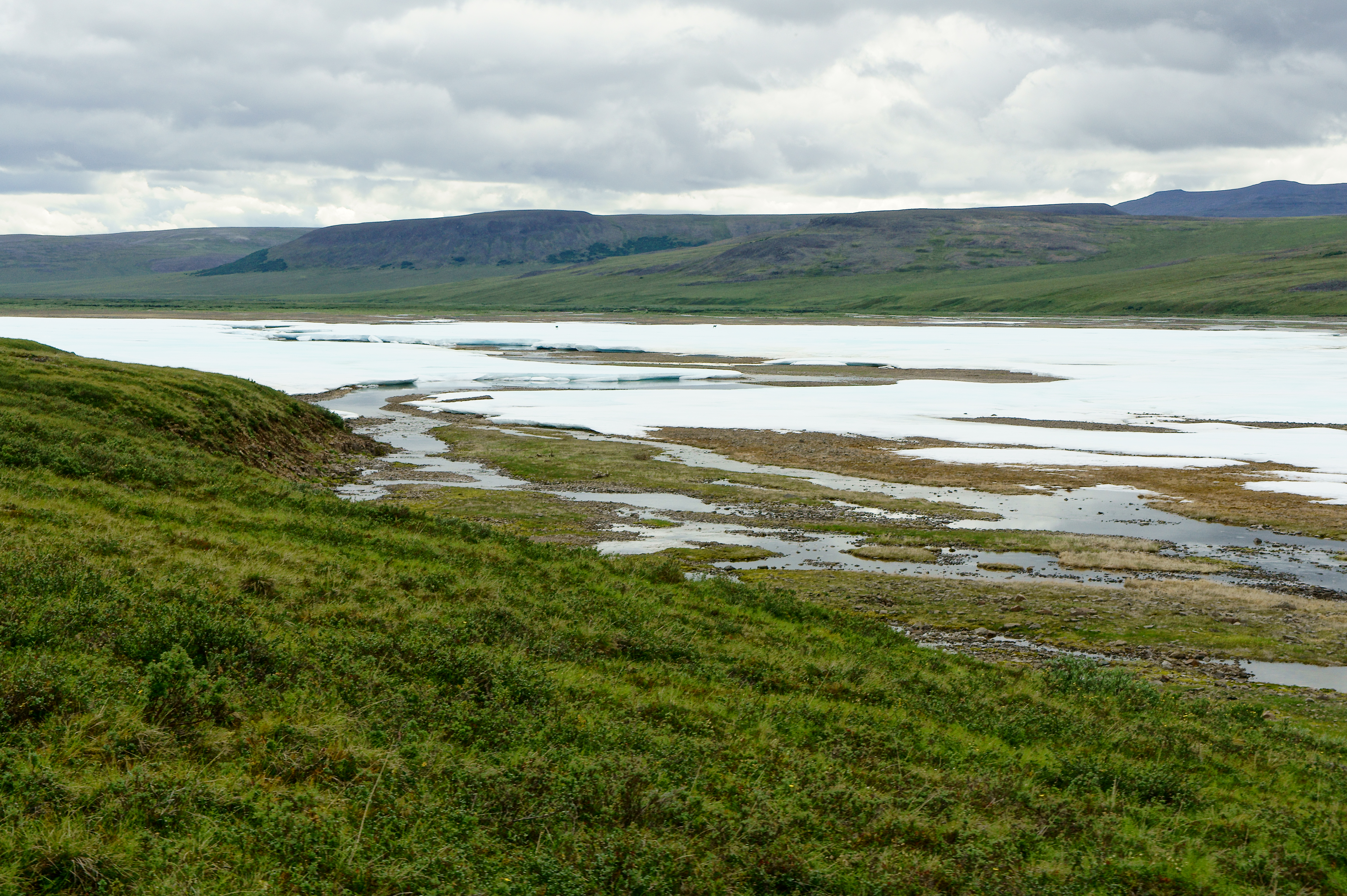 Наледь на реке Варэнокэваам